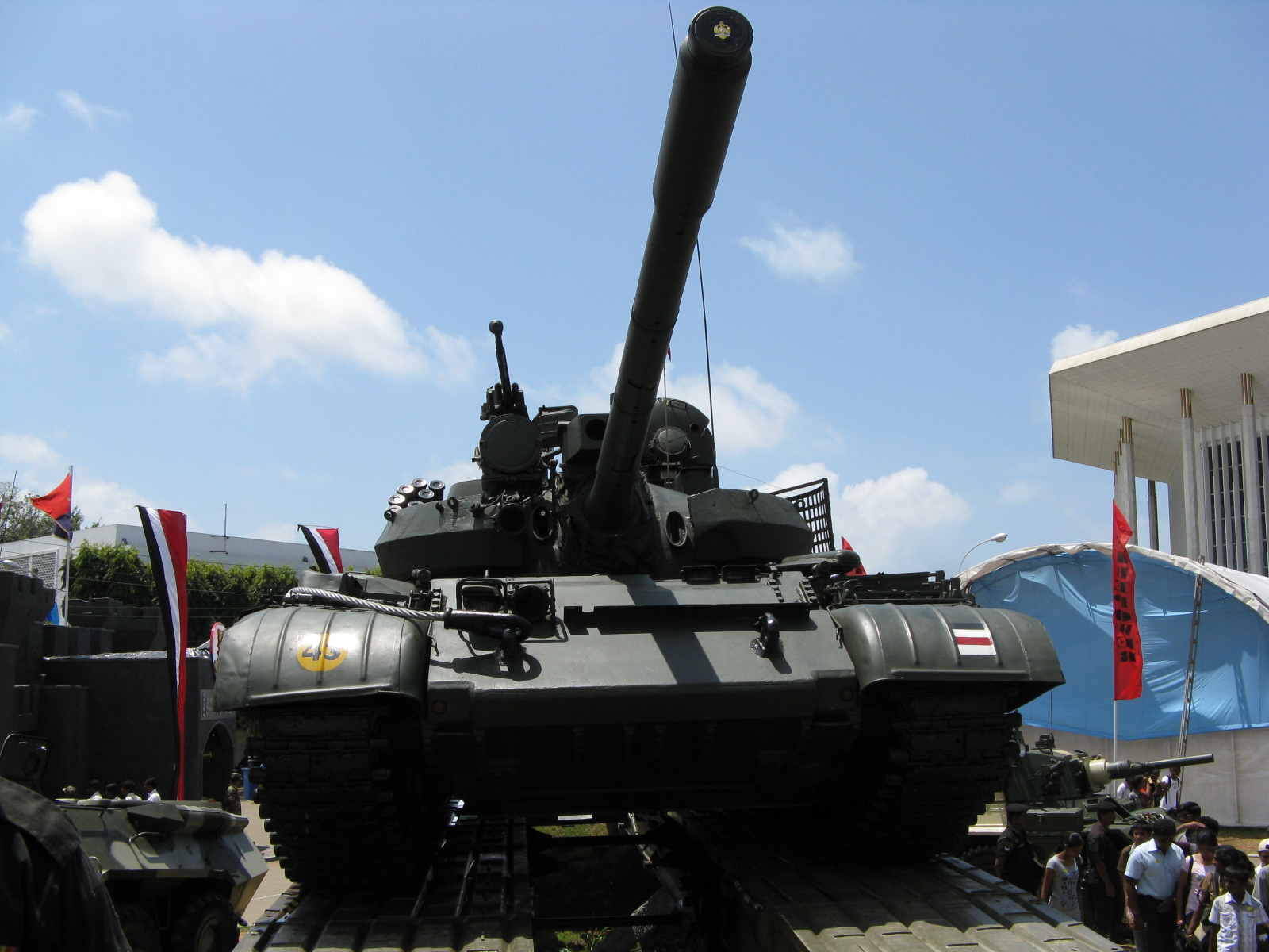 T-55AM2 Main Battle Tank - Sri Lanka Army